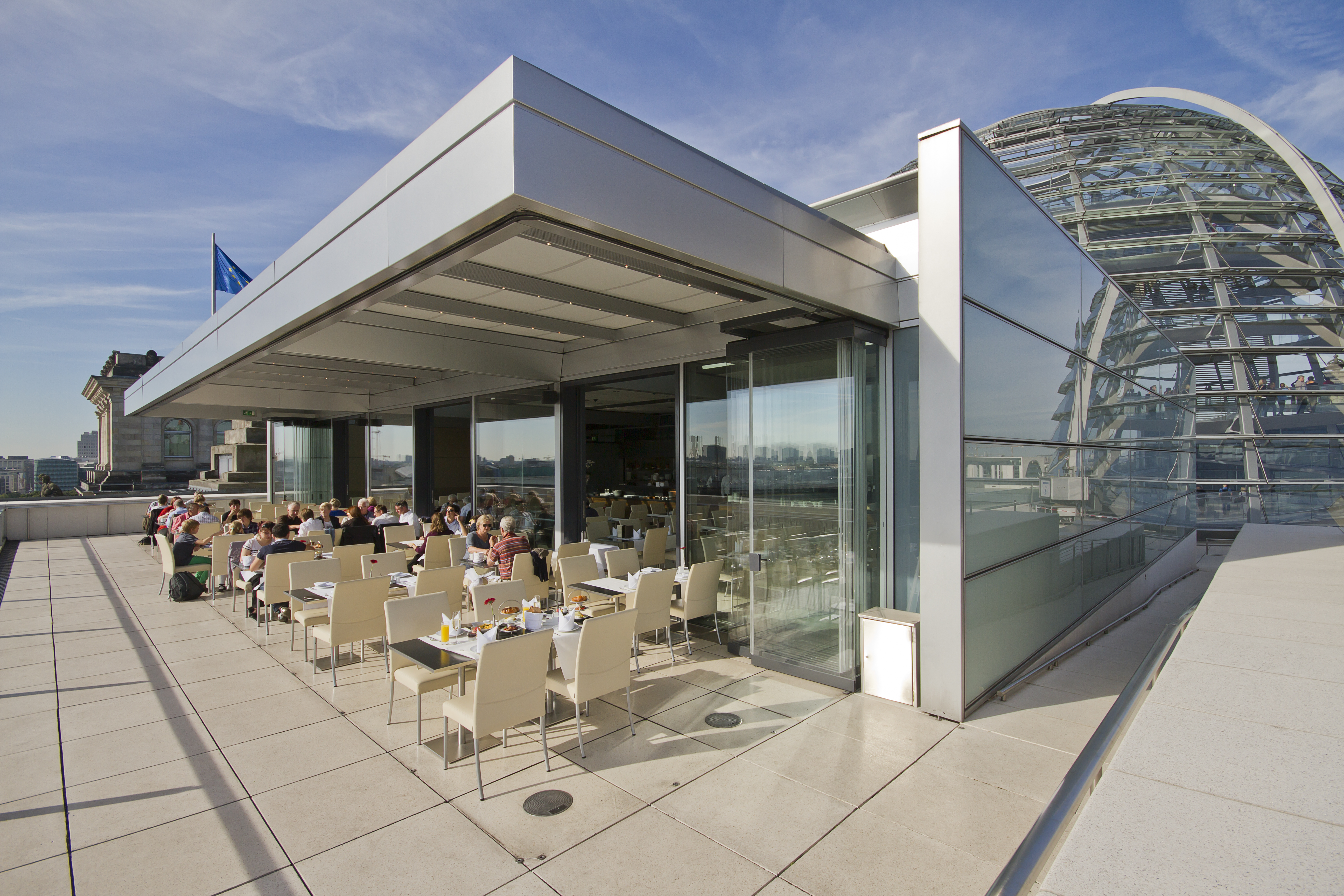 Käfer DACHGARTEN-RESTAURANT im Bundestag in Berlin